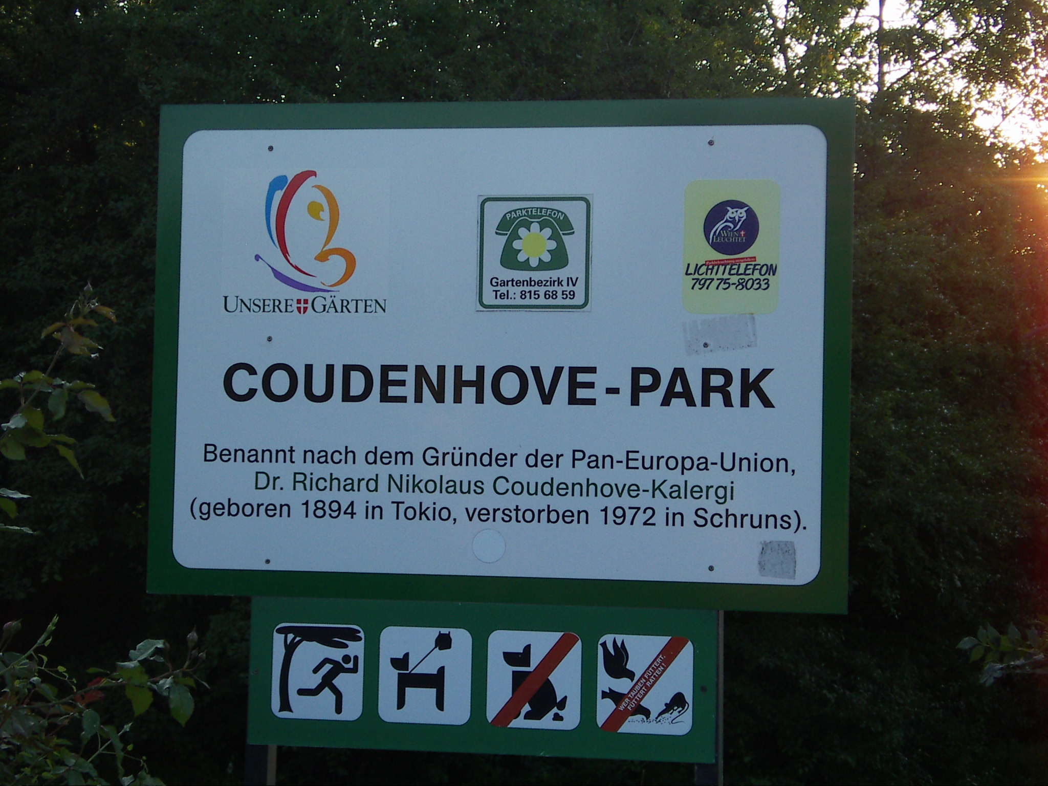 Coudenhove-Park, zu Richard Nikolaus Graf von Coudenhove-Kalergi, neben dem Hofpavillon in Wien, Hinweistafel "Benannt nach dem Gründer der Pan-Europa-Union, Dr. Richard Nikolaus Coudenhove-Kalergi (geboren 1894 in Tokio, verstorben 1972 in Schruns)."